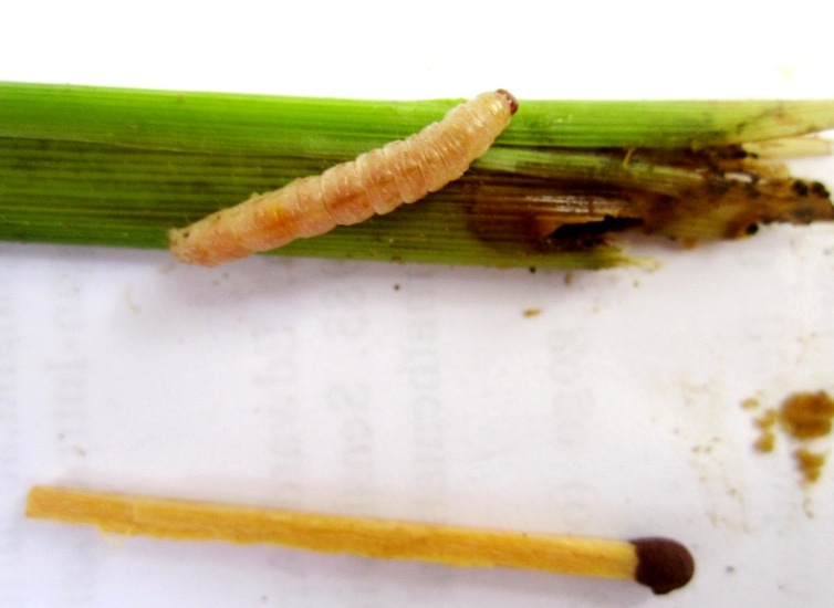 Penggerek batang jagung (Ostrinia furnacalis) pada batang jagung umur 5 minggu. Bagian kanan menunjukkan kerusakan pada pangkal batang yang ditimbulkan oleh kegiatannya. Tangkai korek api sebagai pembanding.